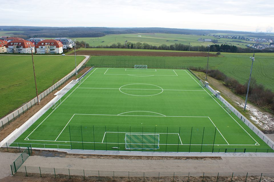 De syntheteschen Terrain an den "Ierzekaulen" (Baujoer 2013), Stade Albert-Kongs.